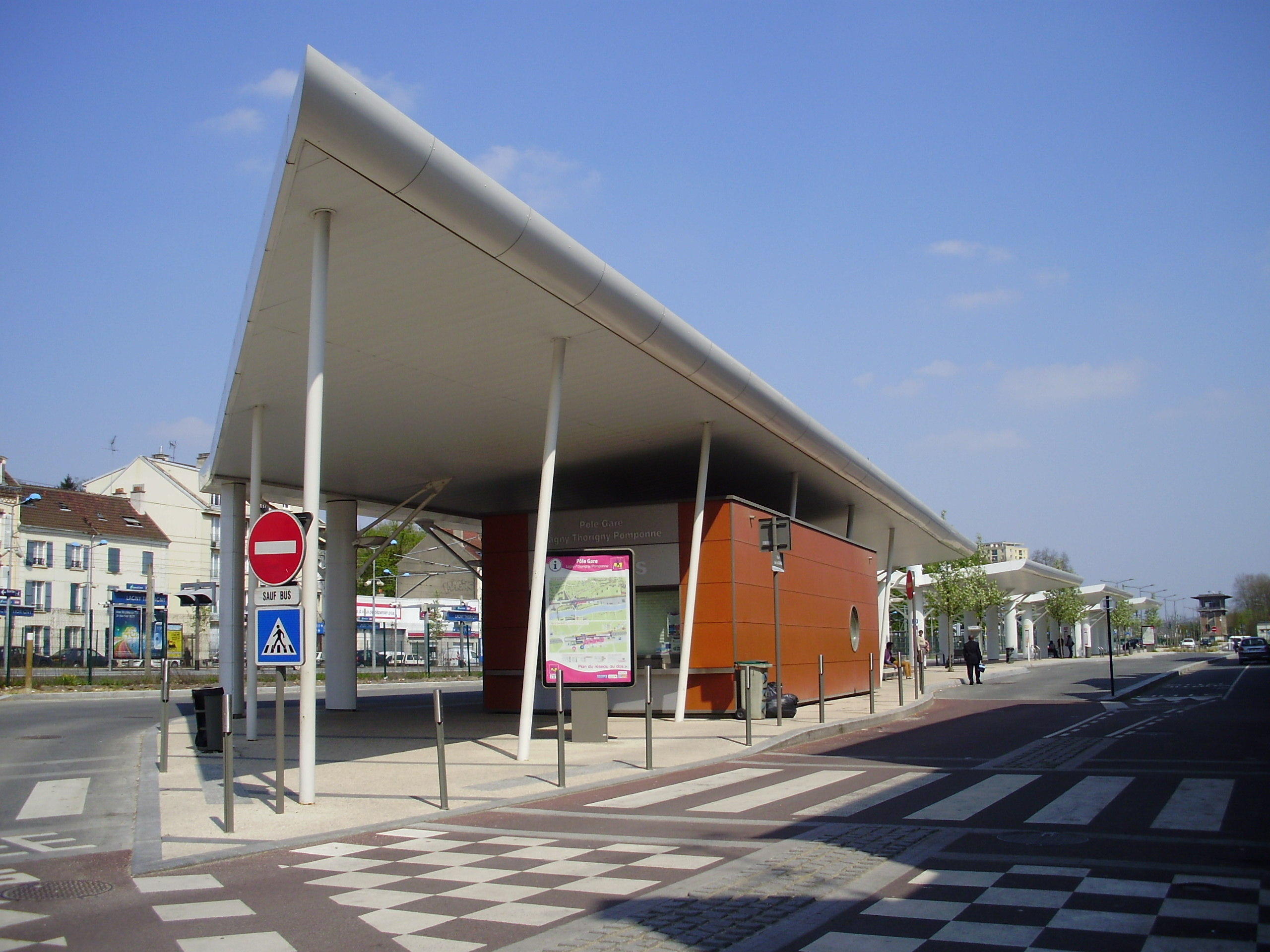 Gare de Lagny - Thorigny, à Thorigny-sur-Marne, Seine-et-Marne, France : Gare routière sur le côté sud des voies, à l'est du bâtiment voyageurs.